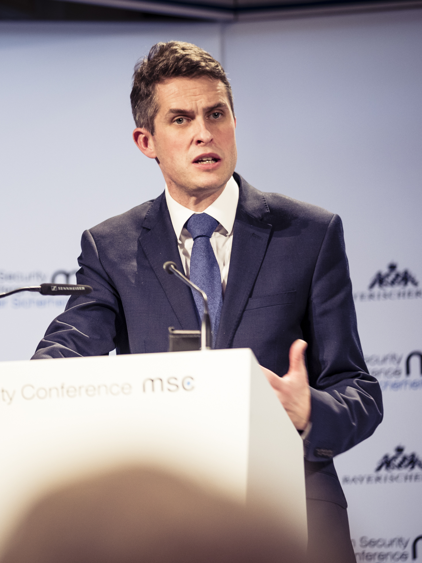 Gavin Williamson während der Münchener Sicherheitskonferenz 2019